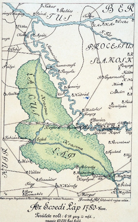 Az Ecsedi láp térképe 1780-ból